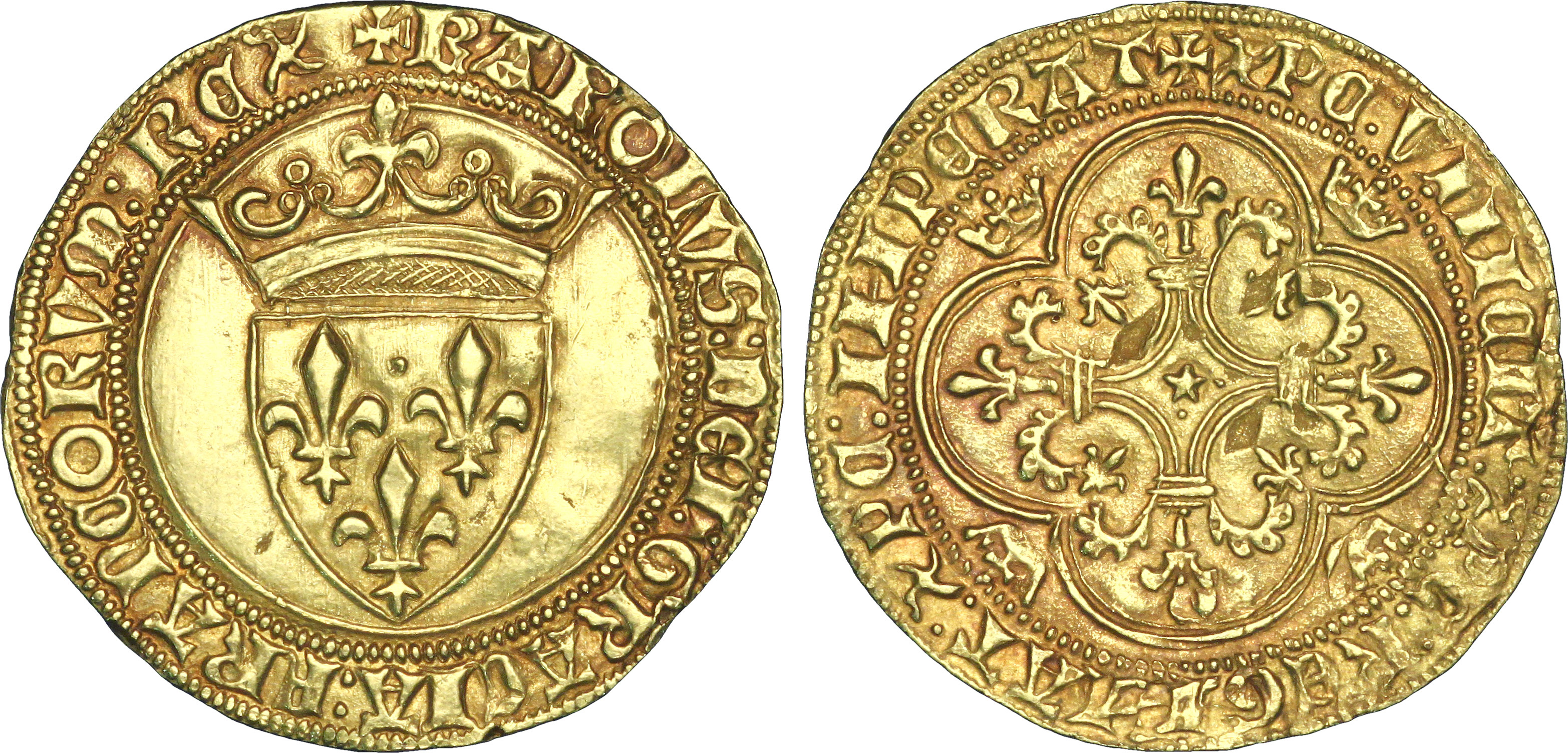 Nom de l'atelier/ville : Toulouse Métal : or Titre en millième : 1000‰ Diamètre : 30mm Axe des coins : 5h. Poids : 3,84g. Titulature avers : + KAROLVS: DEI: GRACIA: FRAnCORVm: REX, (ponctuation par deux sautoirs superposés, O longs). Description avers : Écu de France couronné. Traduction avers : (Charles, par la grâce de Dieu, roi des Francs). Titulature revers : + XPC: VInCIT: XPC: REGNAT XPC INPERAT, (ponctuation par deux points). Description revers : Croix fleurdelisée et feuillue avec une étoile à cinq rais cantonnée de deux points dans un losange curviligne en cœur, le tout dans un quadrilobe cantonné de quatre couronnes. Traduction revers : (Le Christ vainc, le Christ règne, le Christ commande).